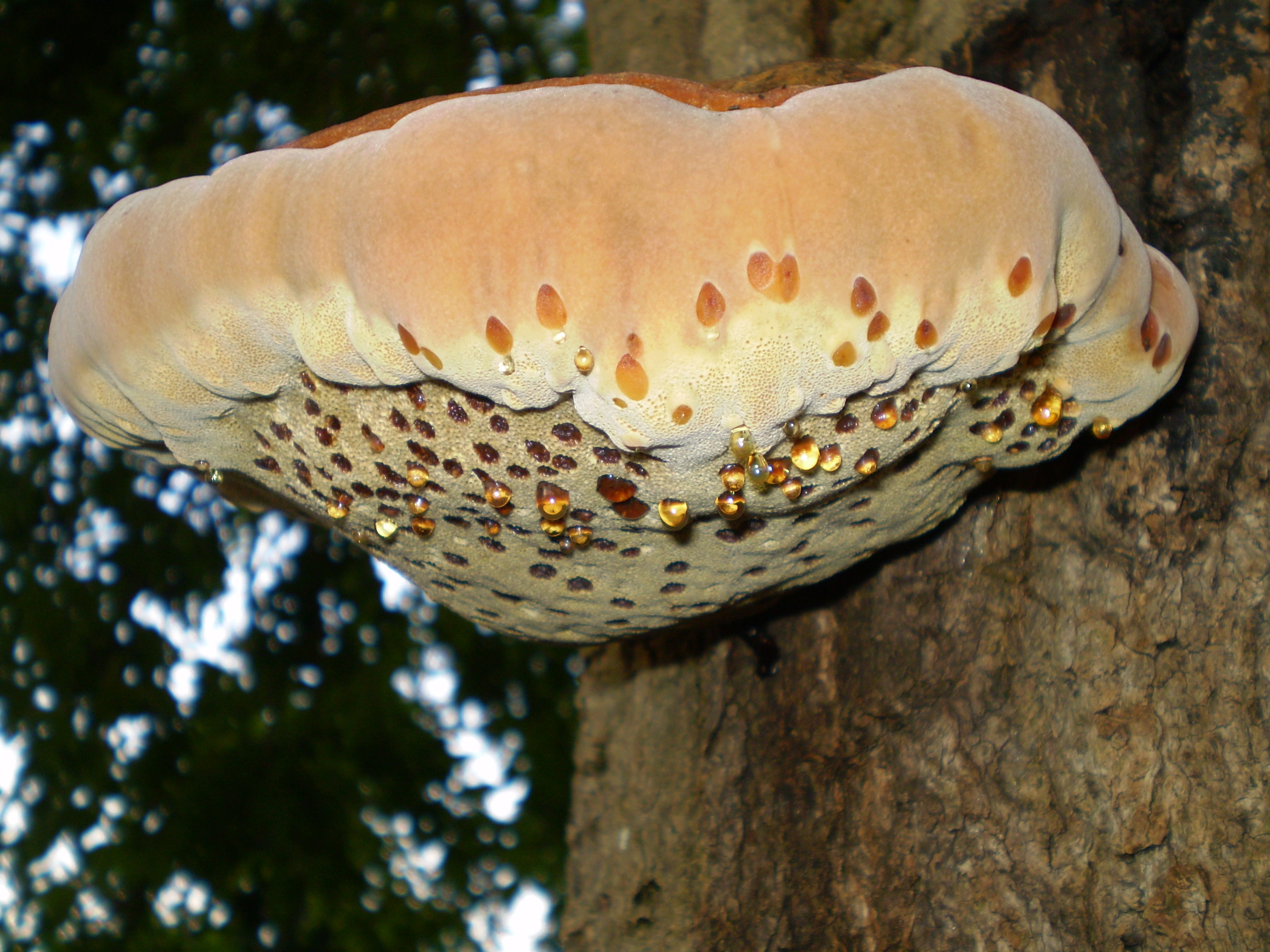 Polypore hérissé (Inonotus hispidus)